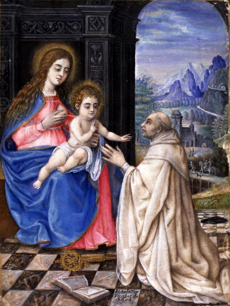 La obra representa a San Bernardo de Claraval adorando al Niño Jesús y a su madre, la Virgen María.